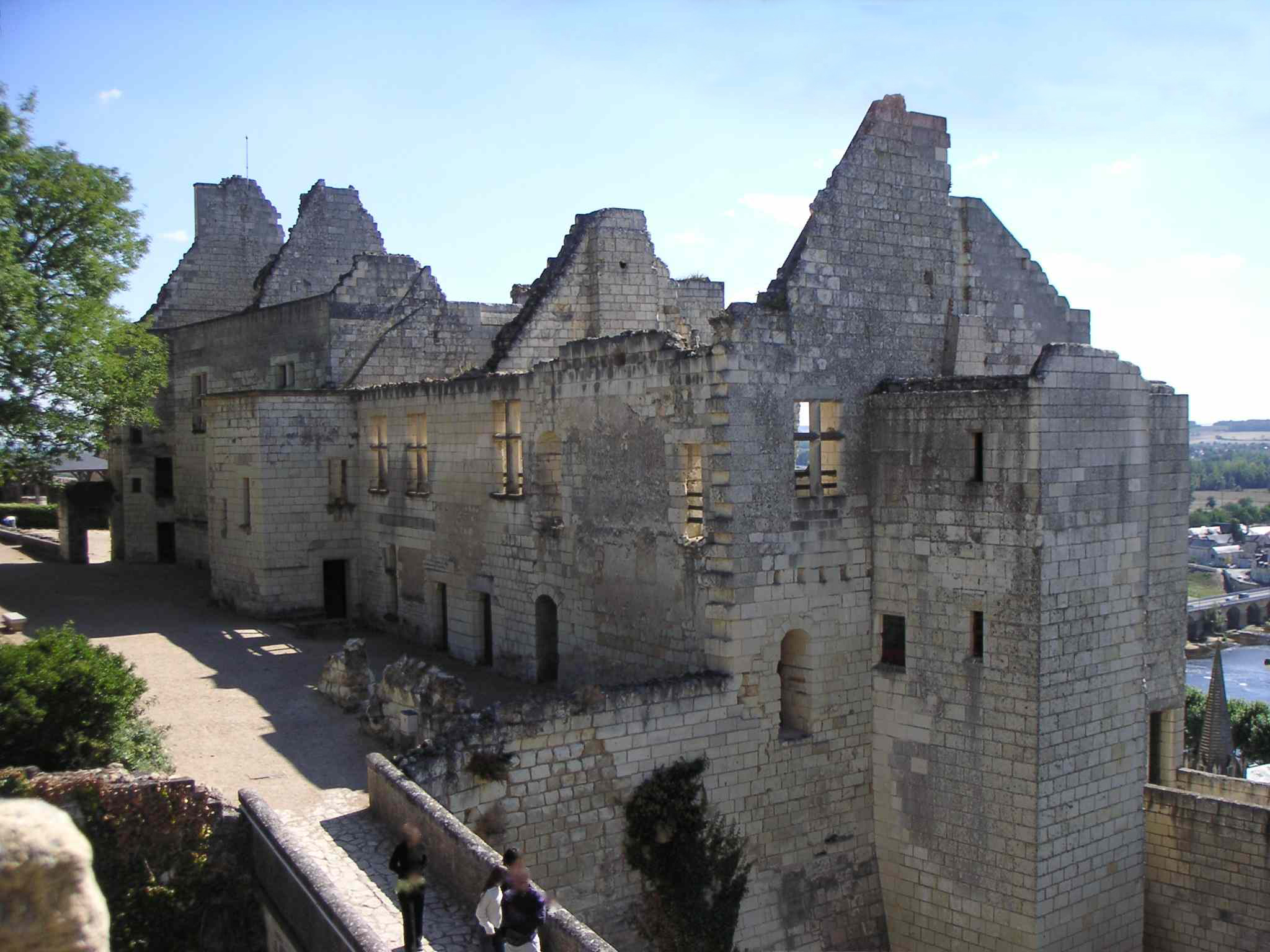 Logis royaux du château de Chinon (France)